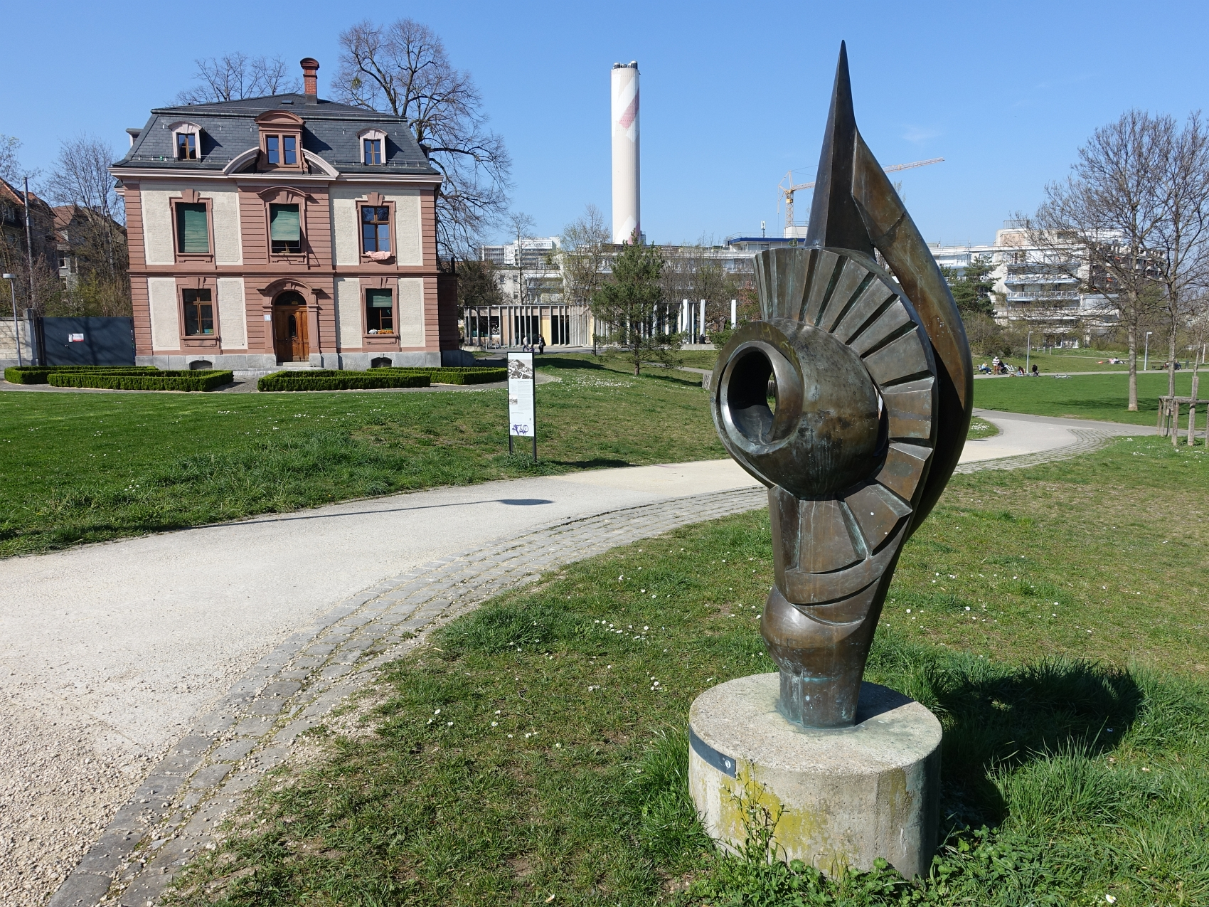 St. Johanns-Park Basel, Skulptur Regio 1992, von Ernst Friedli (1933–2010) Maler, Bildhauer